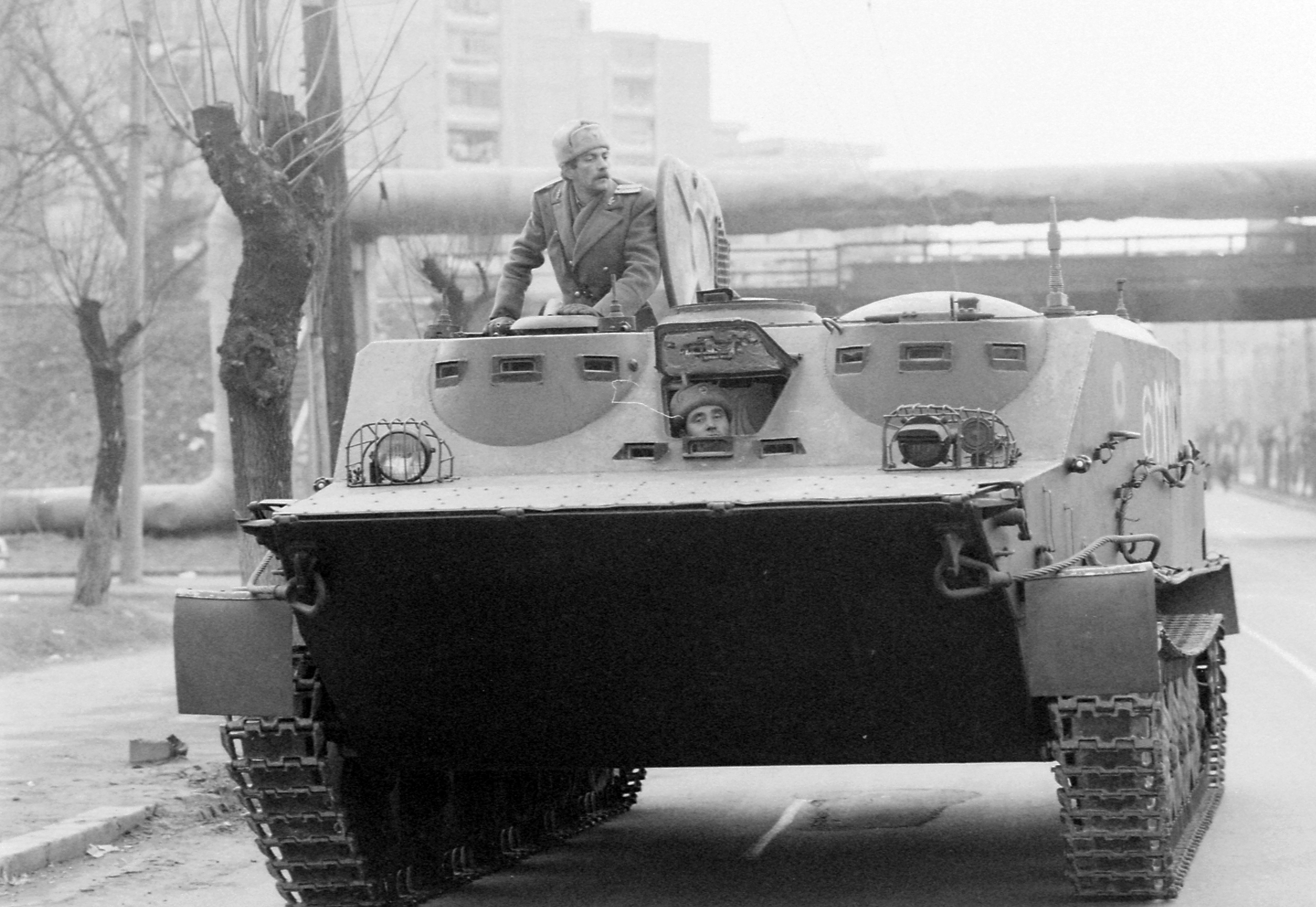 Calea Alexandru Ioan Cuza, Btr-50PU típusú lövészpáncélos jármű. Romániai forradalom. Location: Romania, Transylvania, Timisoara Tags: military, combat vehicle Title: Calea Alexandru Ioan Cuza, Btr-50PU típusú lövészpáncélos jármű. Romániai forradalom.